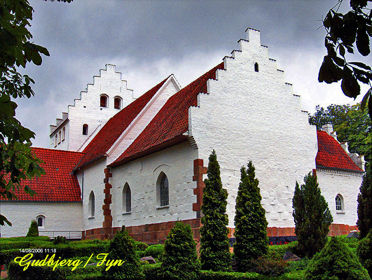 fra sydøst